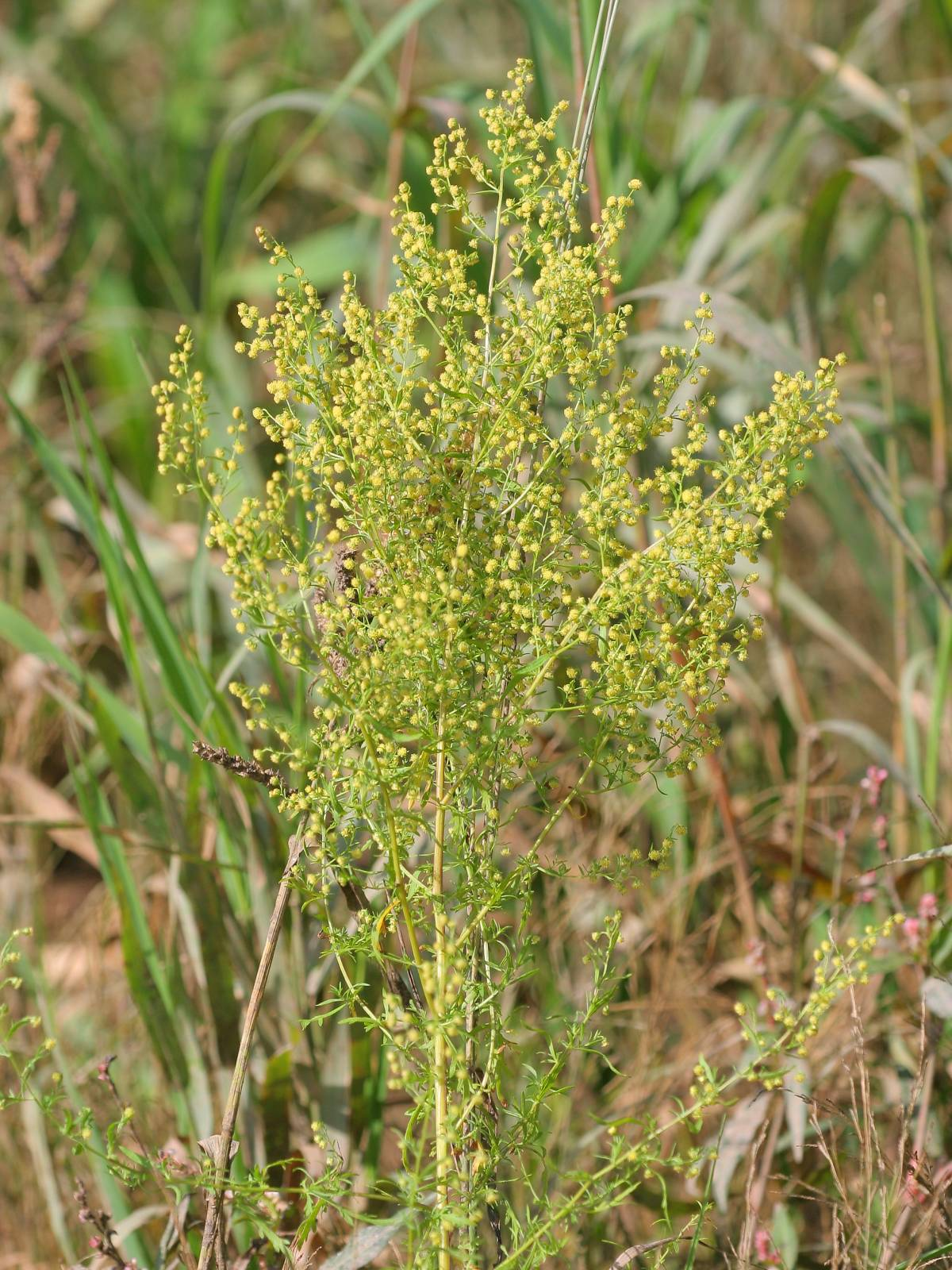 Einjähriger Beifuß (Artemisia annua)